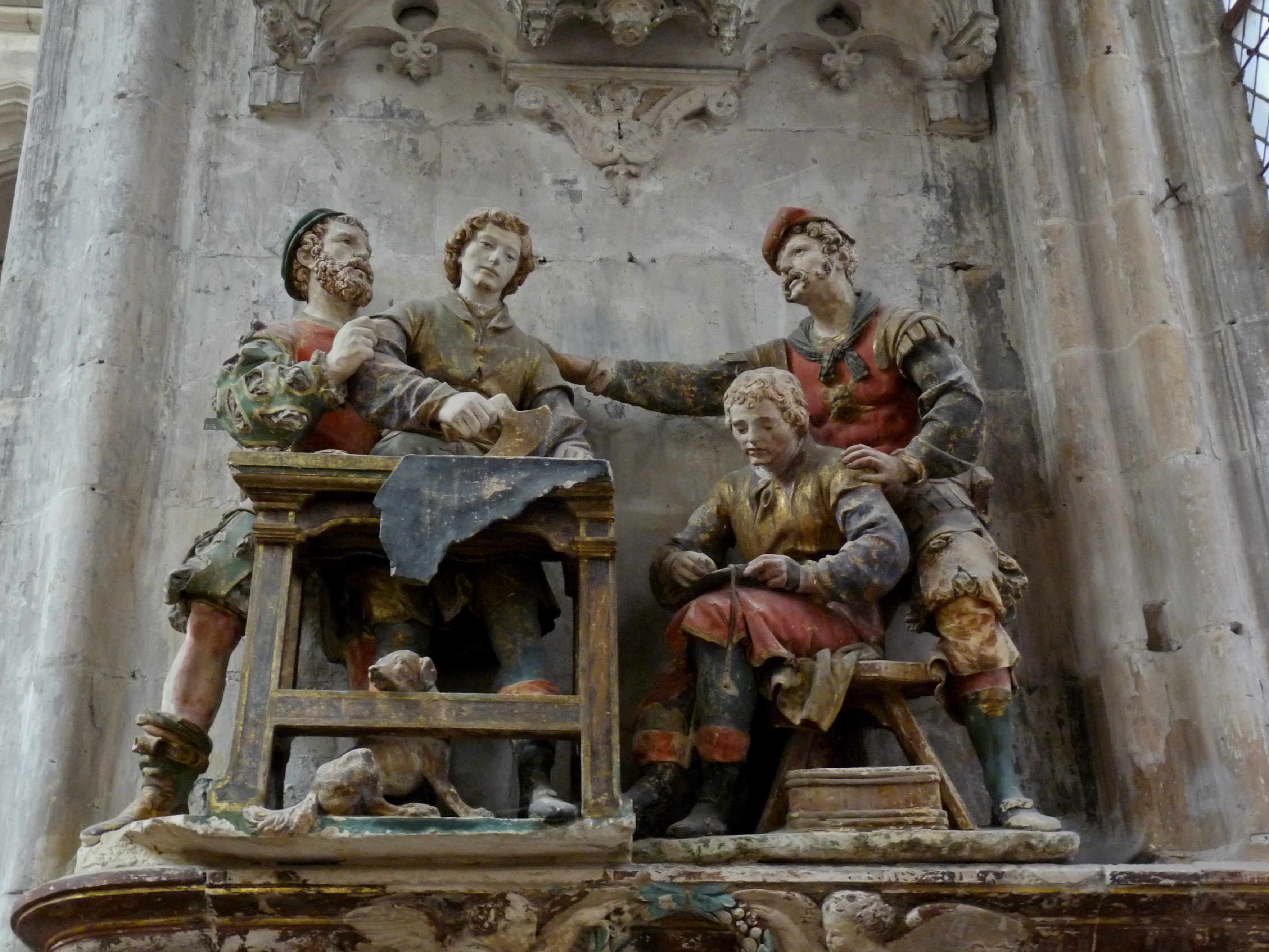 L'arrestation des saints Crépin et Crépinien, saints-patrons des tanneurs (groupe sculpté polychrome de l'église Saint Pantaléon de Troyes (vers 1540-1560)).